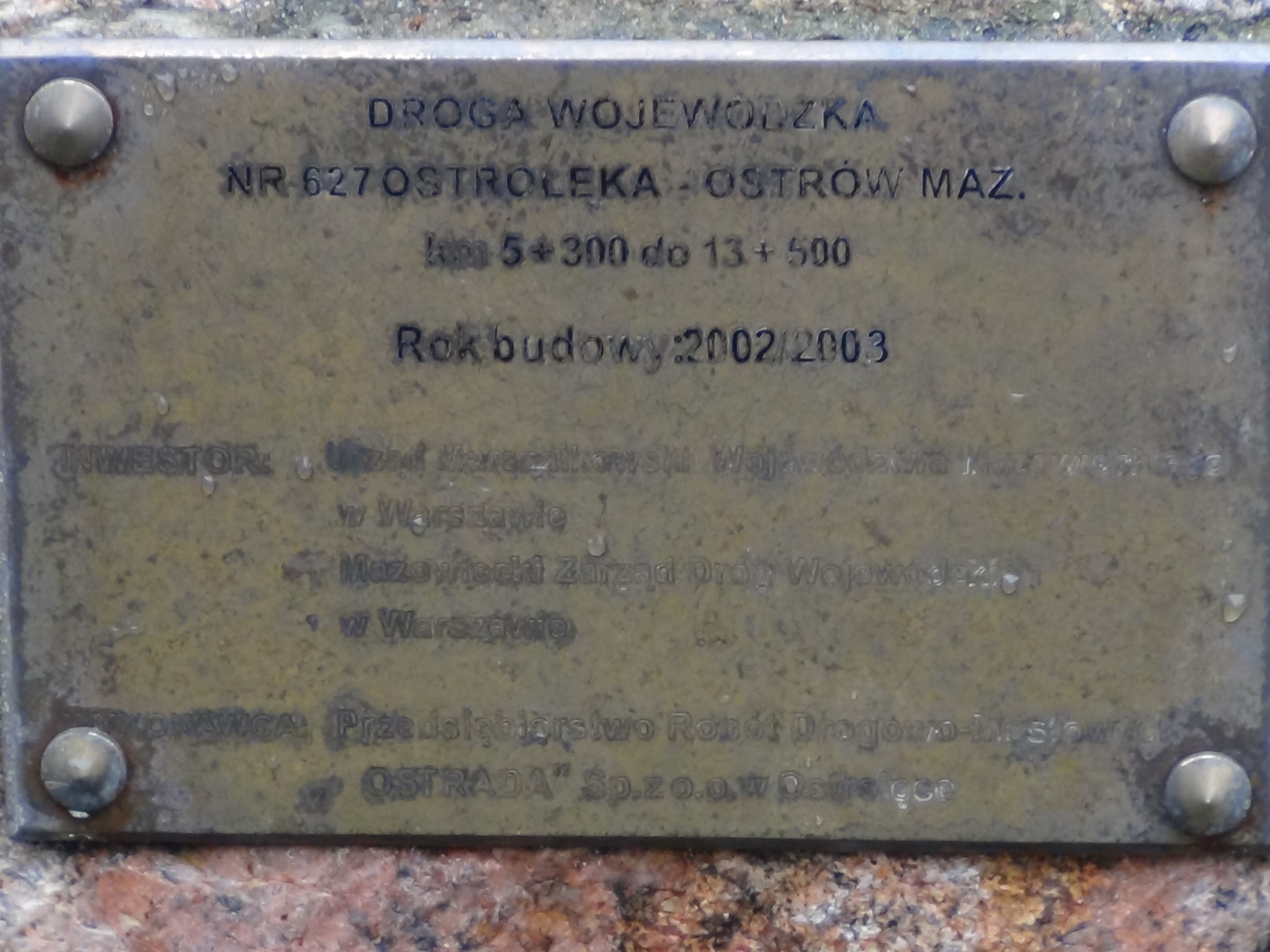 Tablica